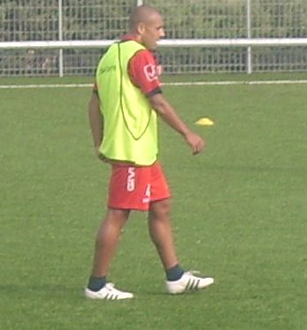 Almiron al centro sportivo Torre del Grifo Village